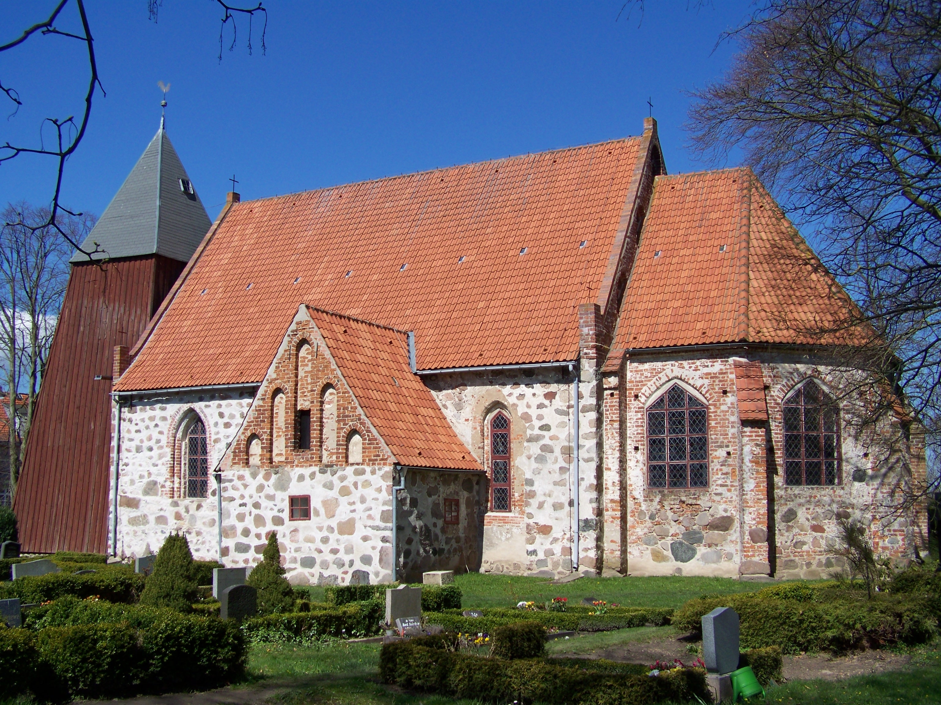 Elmenhorst, Kirche - Ansicht vom Kirchhof (2008-04-20)